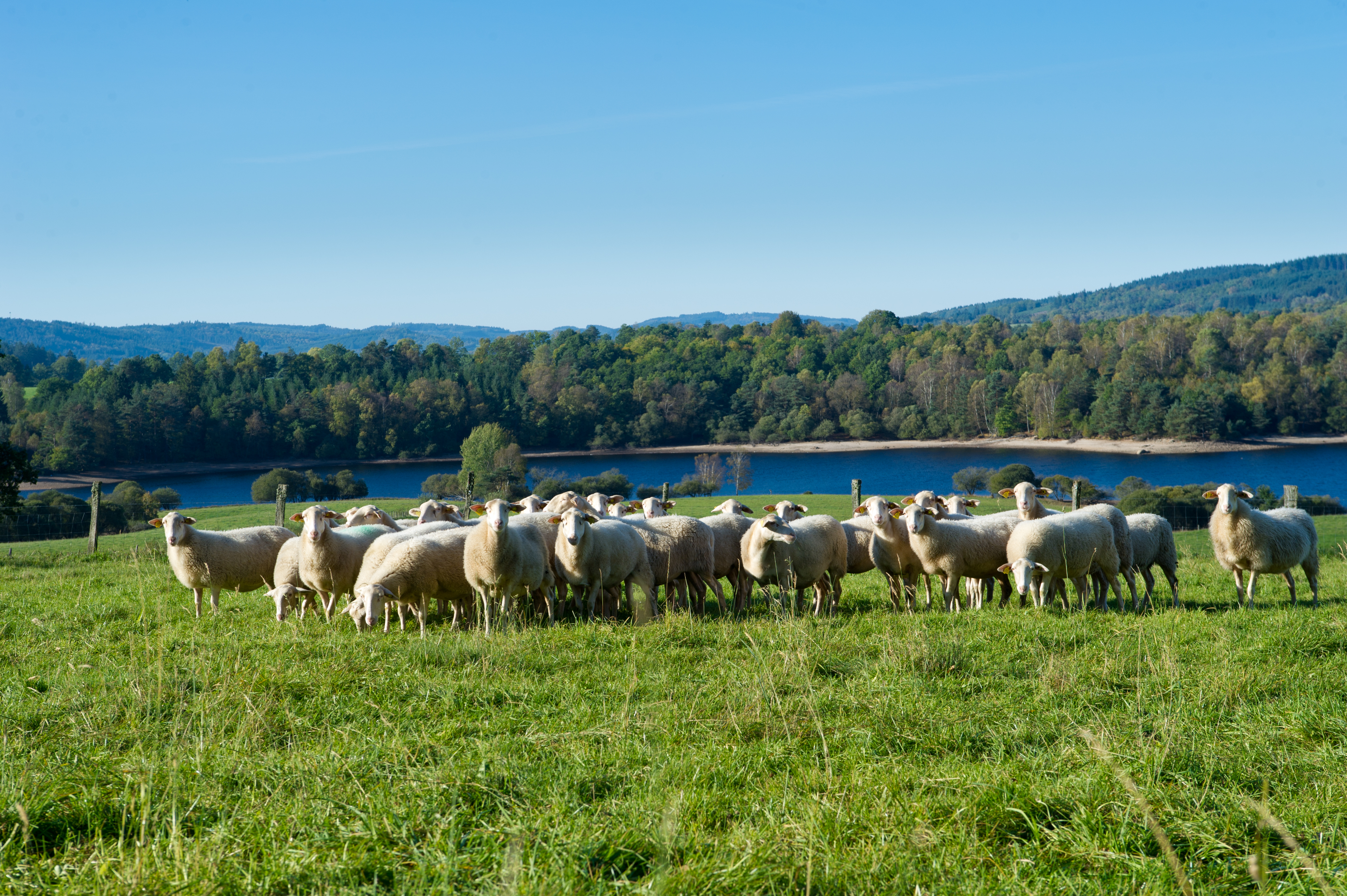 CREPAL 2011 Moutons sur le Plateau de Millevaches IGP agneau du limousin